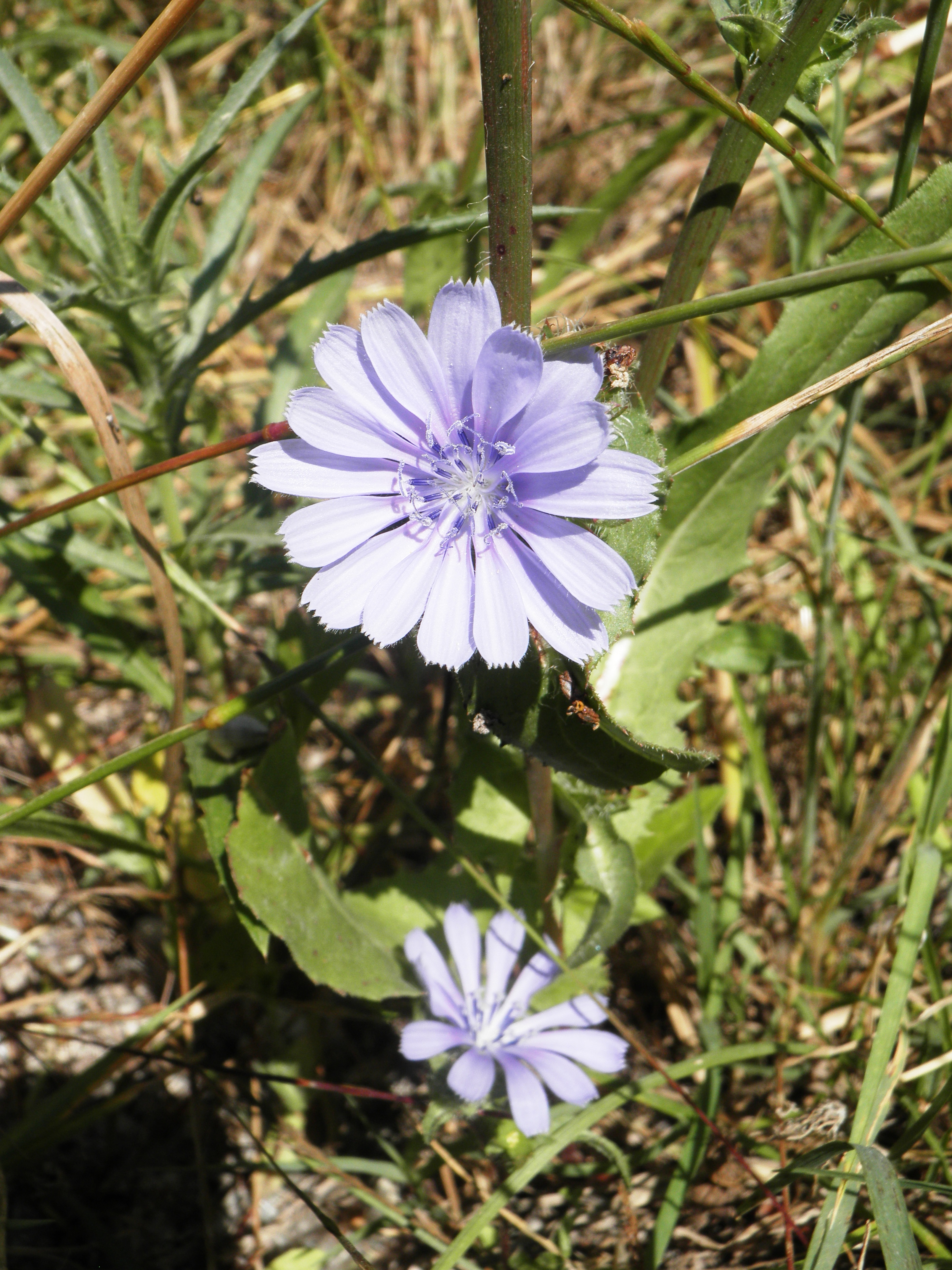 Cichorium pumilum עולש מצוי